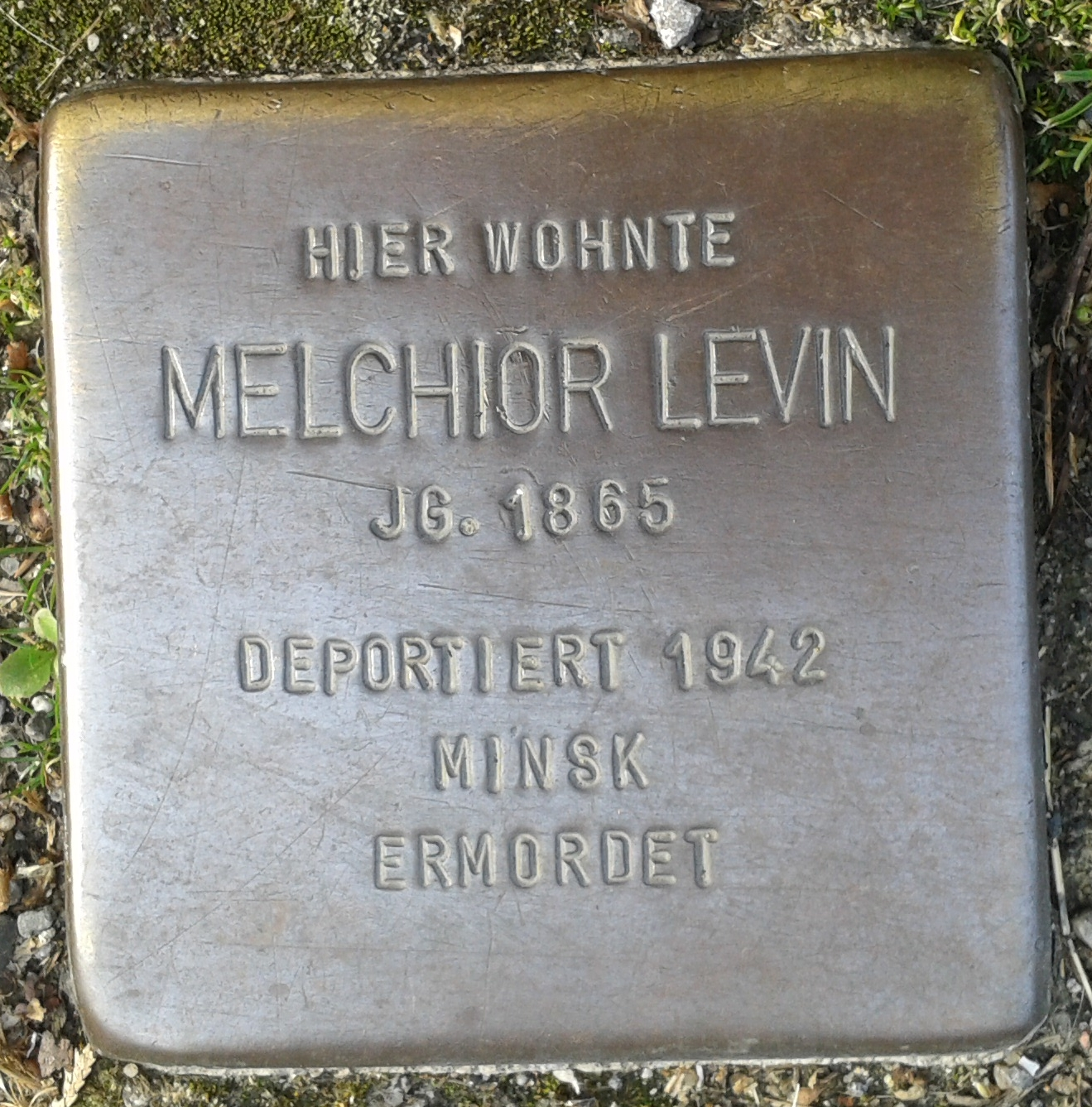 Stolperstein Selm Hauptstraße 34 Melchior Levin